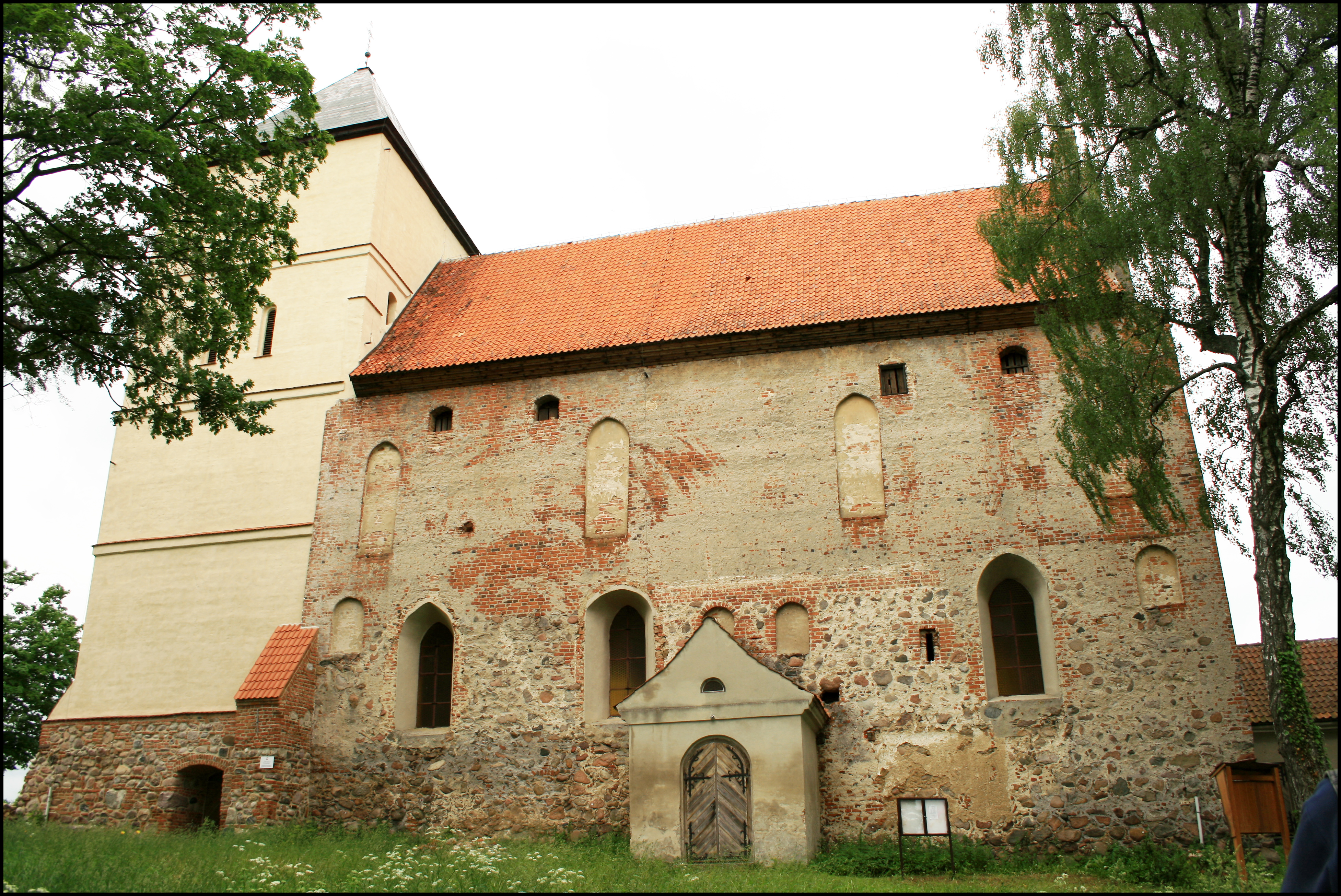 Zamek w Bezławkach